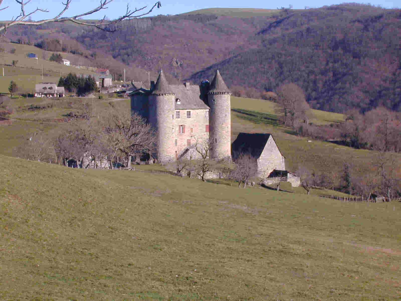 Chateau de senezergues (15)